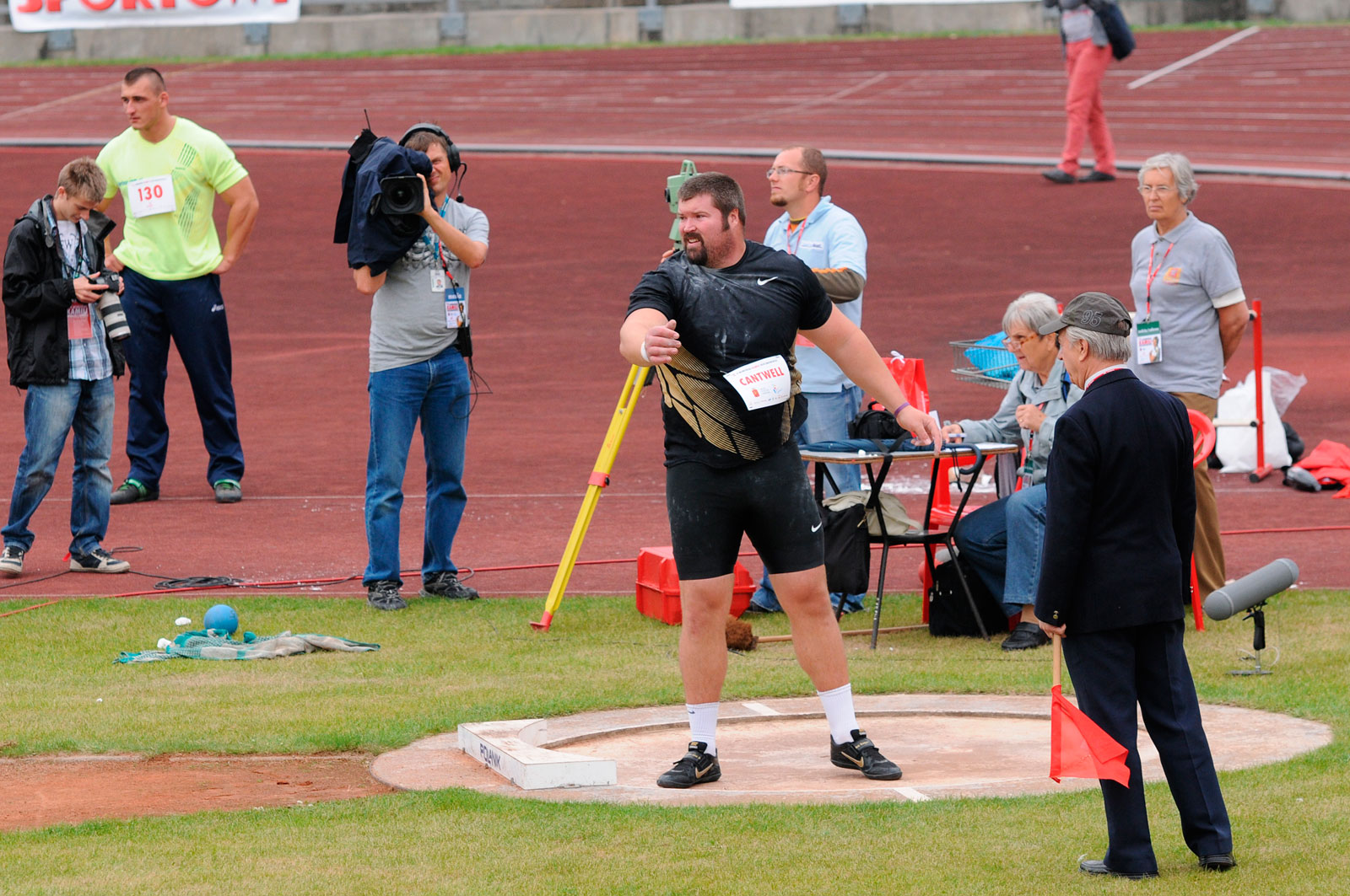 Christian Cantwell podczas startu w 2 Memoriale Kamili Skolimowskiej w Warszawie